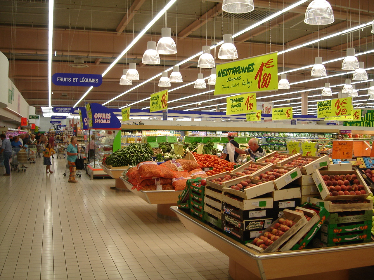 Summary Obst- und Gemüseabteilung im Hypermarkt E. Leclerc in Trélissac, Frankreich. Selbst fotografiert von Benutzer:Bordeaux im August 05. Licensing